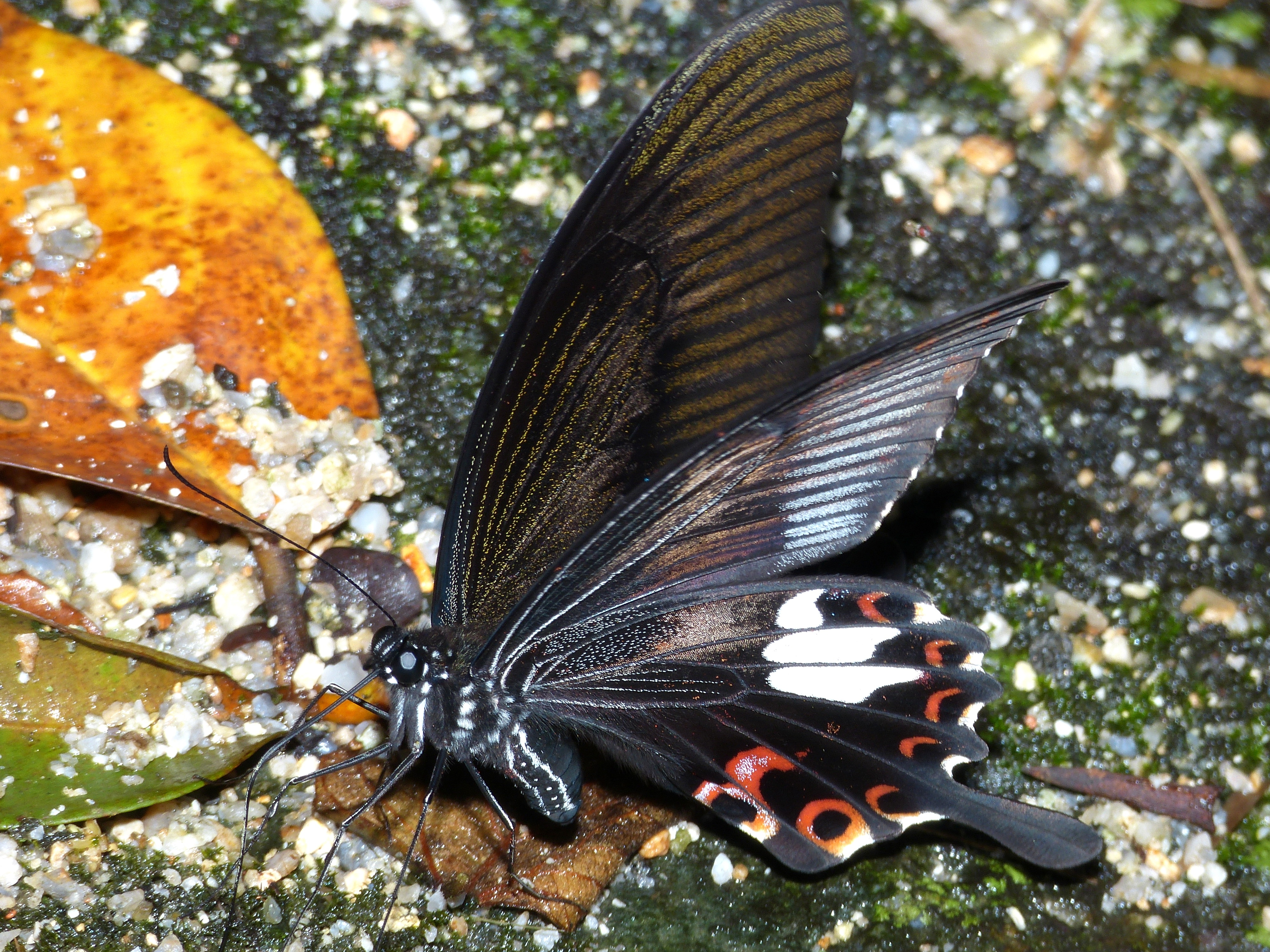 Tapah Hills, Perak, MALAYSIA